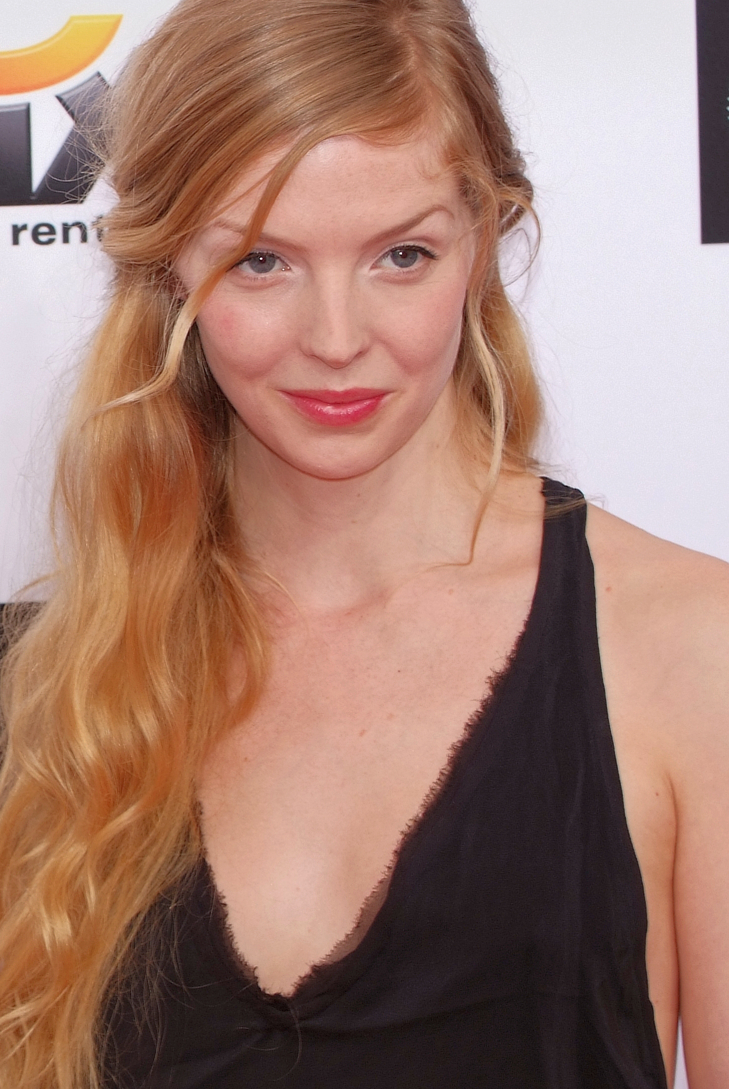 Studio Hamburg Nachwuchspreis 2012 Pheline Roggan